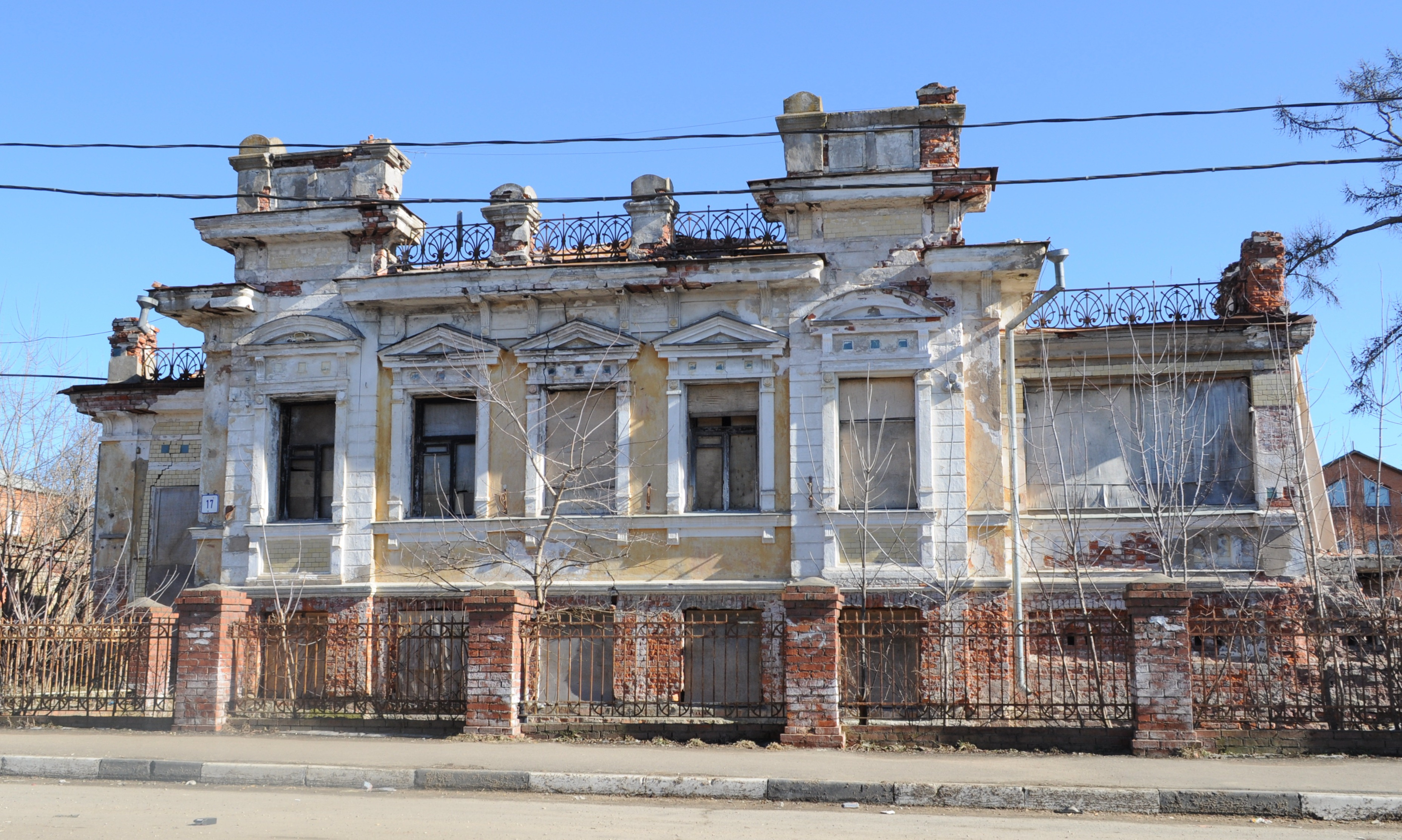 Городская усадьба. Улица Красных Партизан, 17, Можайск